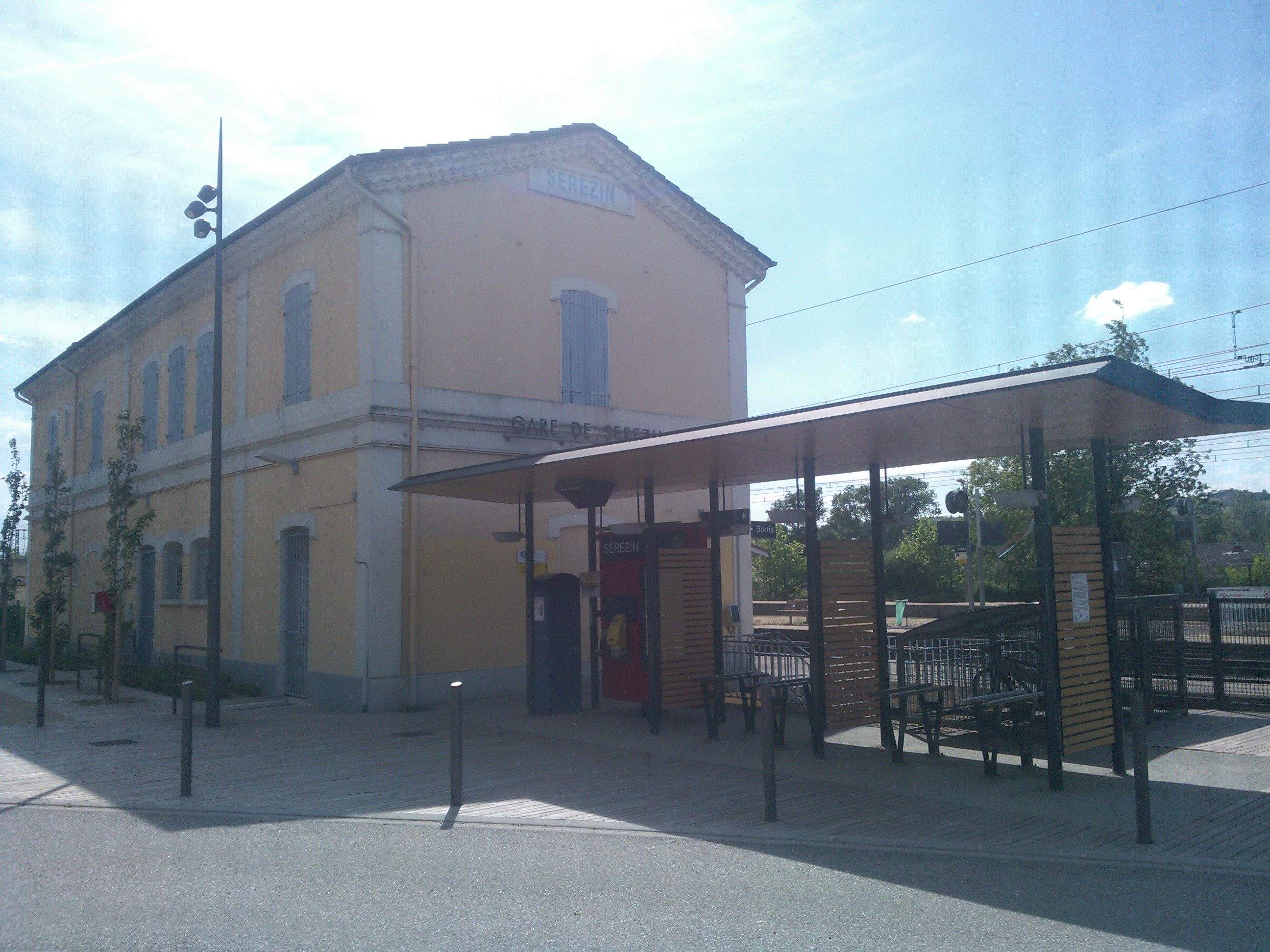 Vue de la gare de Sérézin (69)